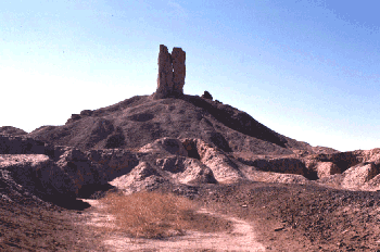 فثغى